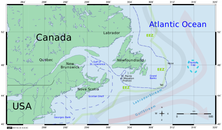 canada-usa-golfstream-atlantic